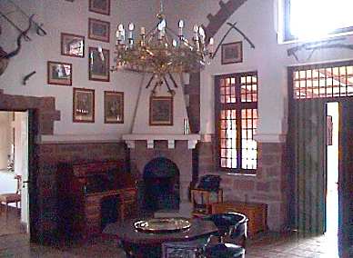 Eingangshalle von Schloss Duwisib, Namibia 1998